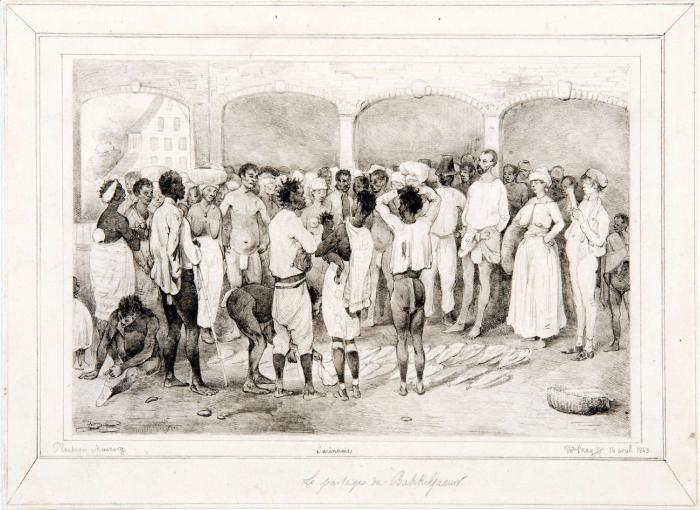 Tekening. Op de plantages was men gewoon halfjaarlijks gebruiksvoorwerpen en duurzaam voedsel, uit te delen volgens voorschriften van het plantagereglement. Hier wordt bakkeljauw (gezouten kabeljauw) uitgedeeld, welke meestal vanuit Noord-Amerika werd geïmporteerd. Rechts op de voorgrond staat een Europeaan, de z.g. blankofficier of opzichter, die ieders aandeel volgens de lijst vaststelt. Plantage Meerzorg ligt aan de rechteroever van de Suriname-rivier, ongeveer ter hoogte van Paramaribo.. Potloodtekening plantage Meerzorg Suriname, door Th. Bray